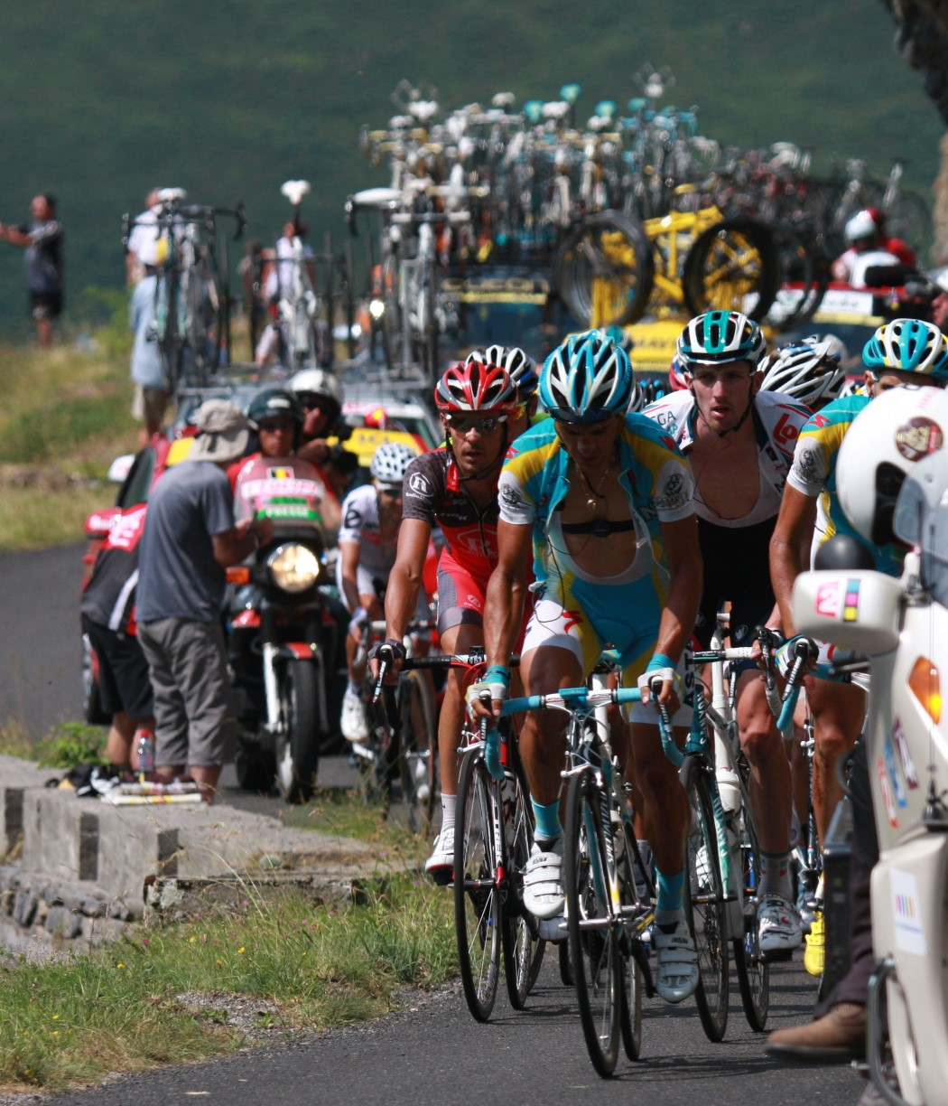 5873 eerste peloton op aubisque